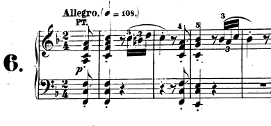 Compassos iniciais do primeiro movimento da Sonata para piano n.º 6, Op. 10 nº 2 de Ludwig van Beethoven